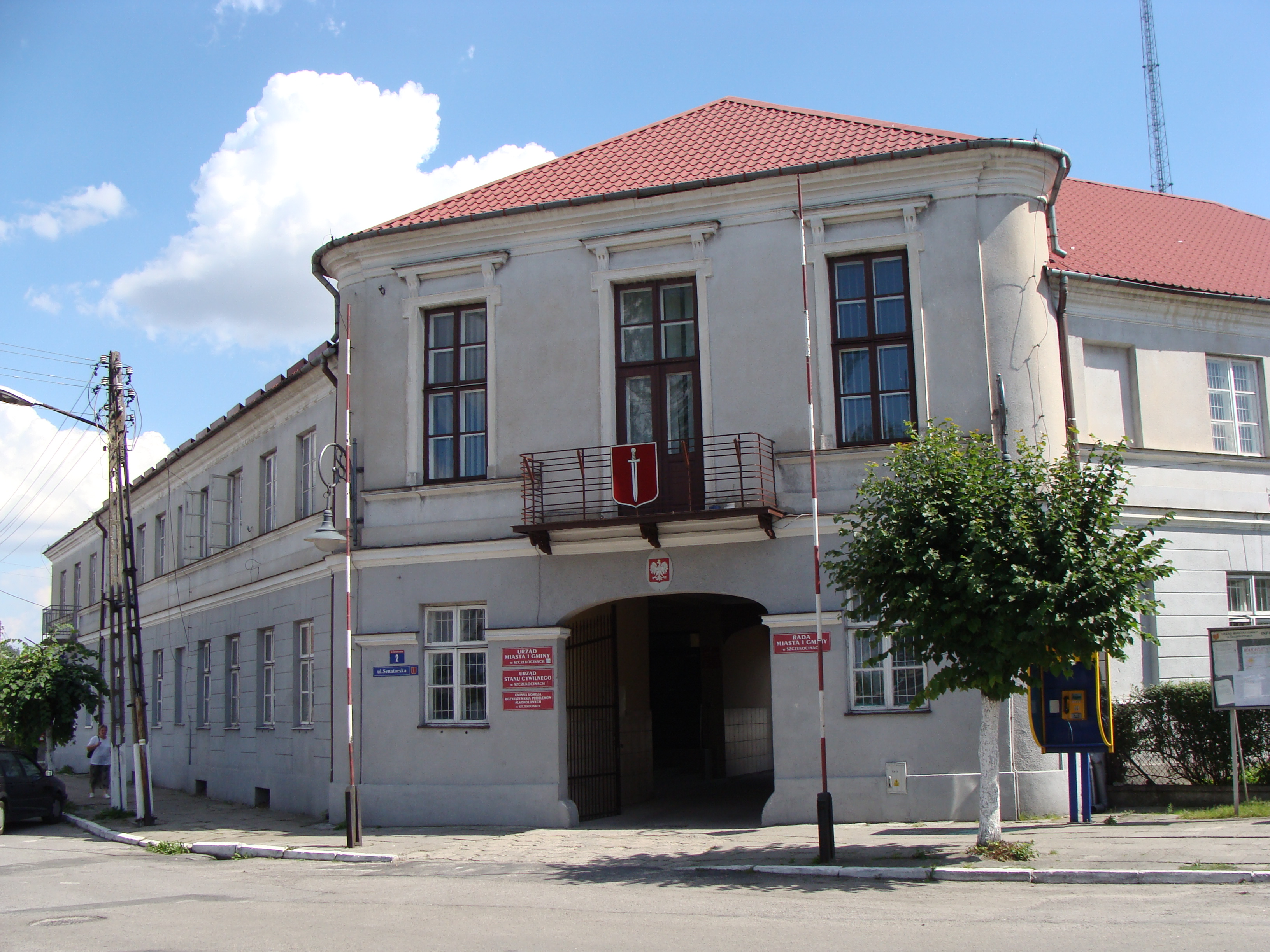 Urząd Miasta i Gminy w Szczekocinach